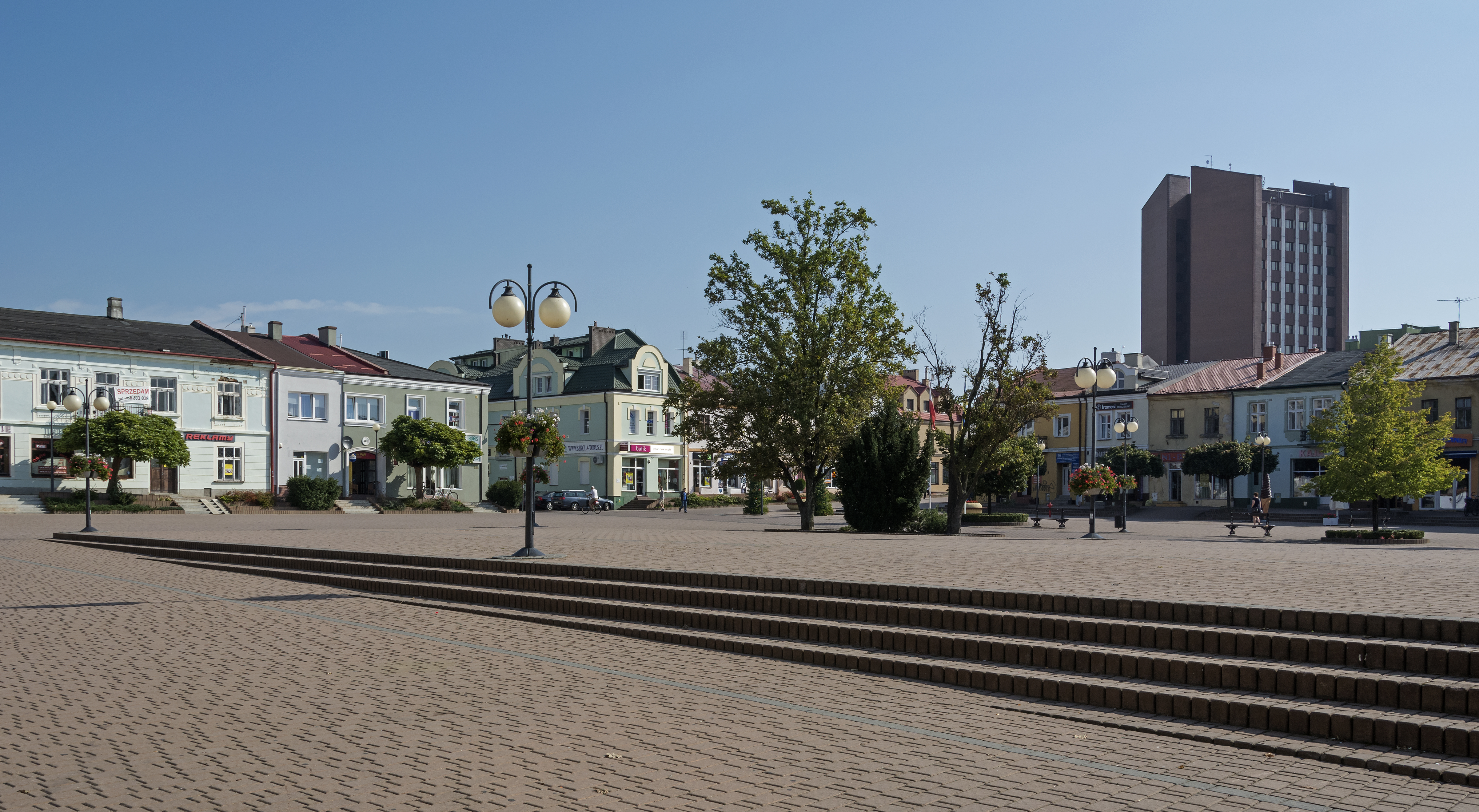 Tarnobrzeg, układ urbanistyczno-krajobrazowy, XVI, XVII-XIX